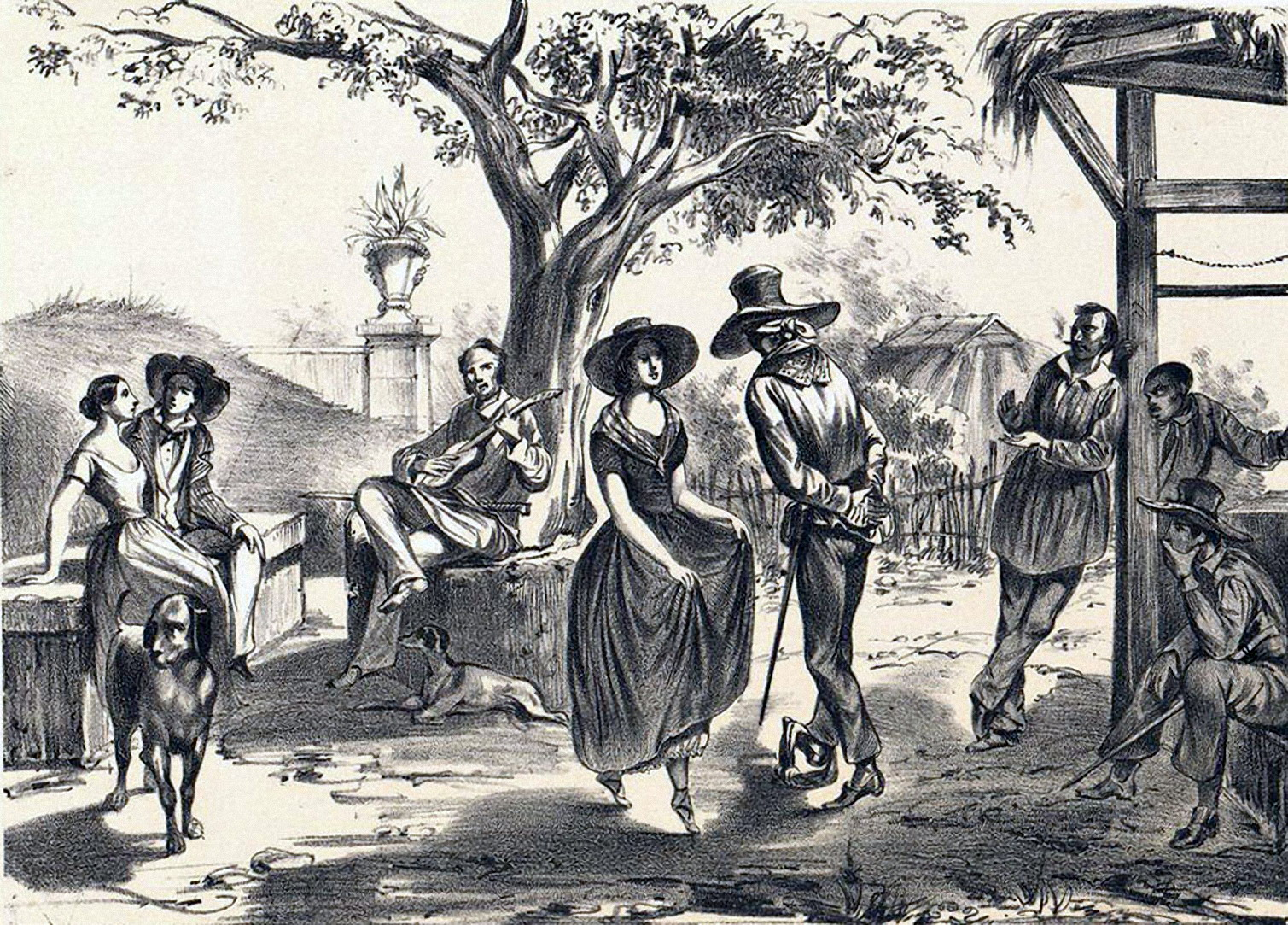 El zapateado